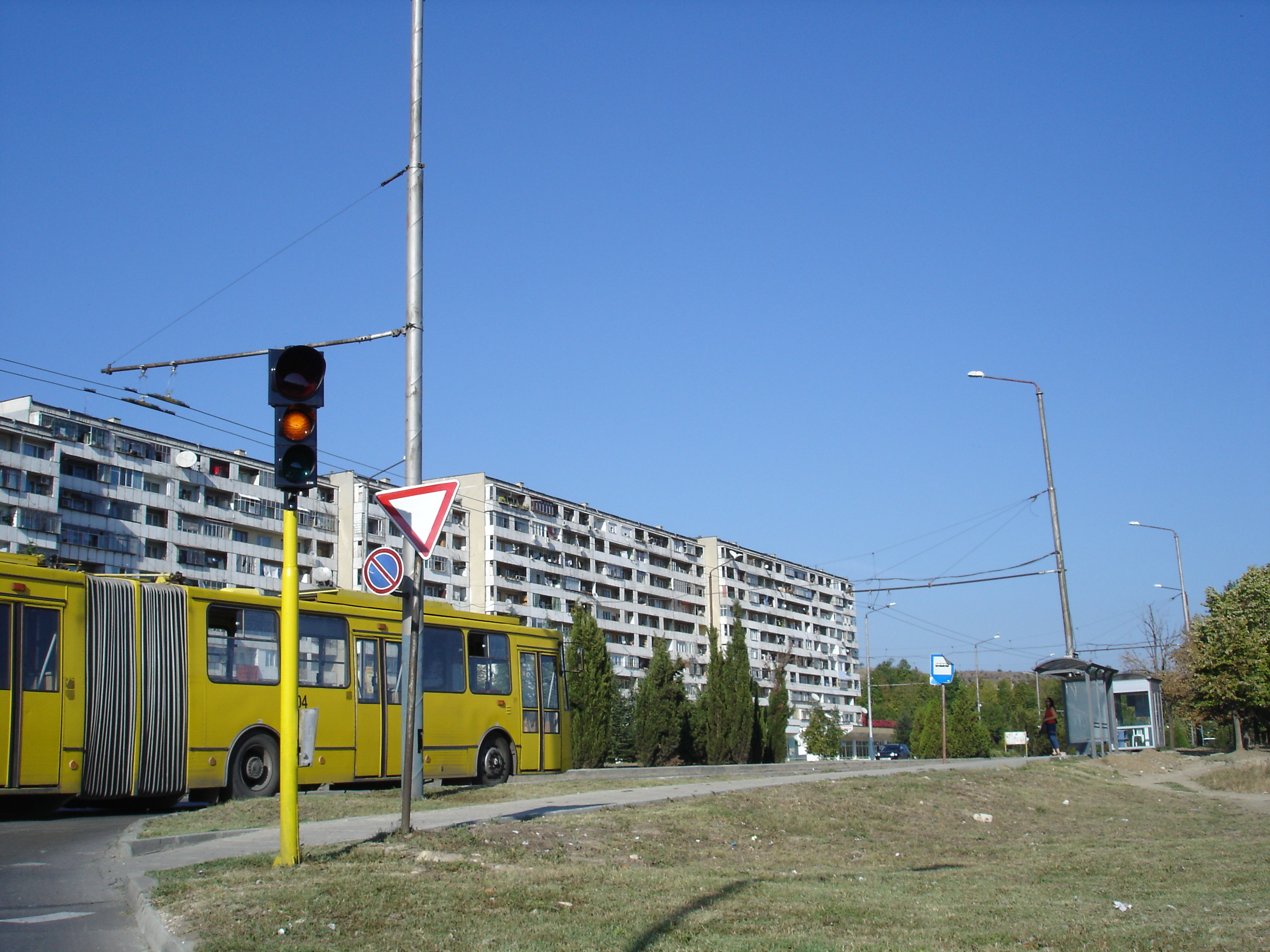 Quarter Vladislavovo, Varna.